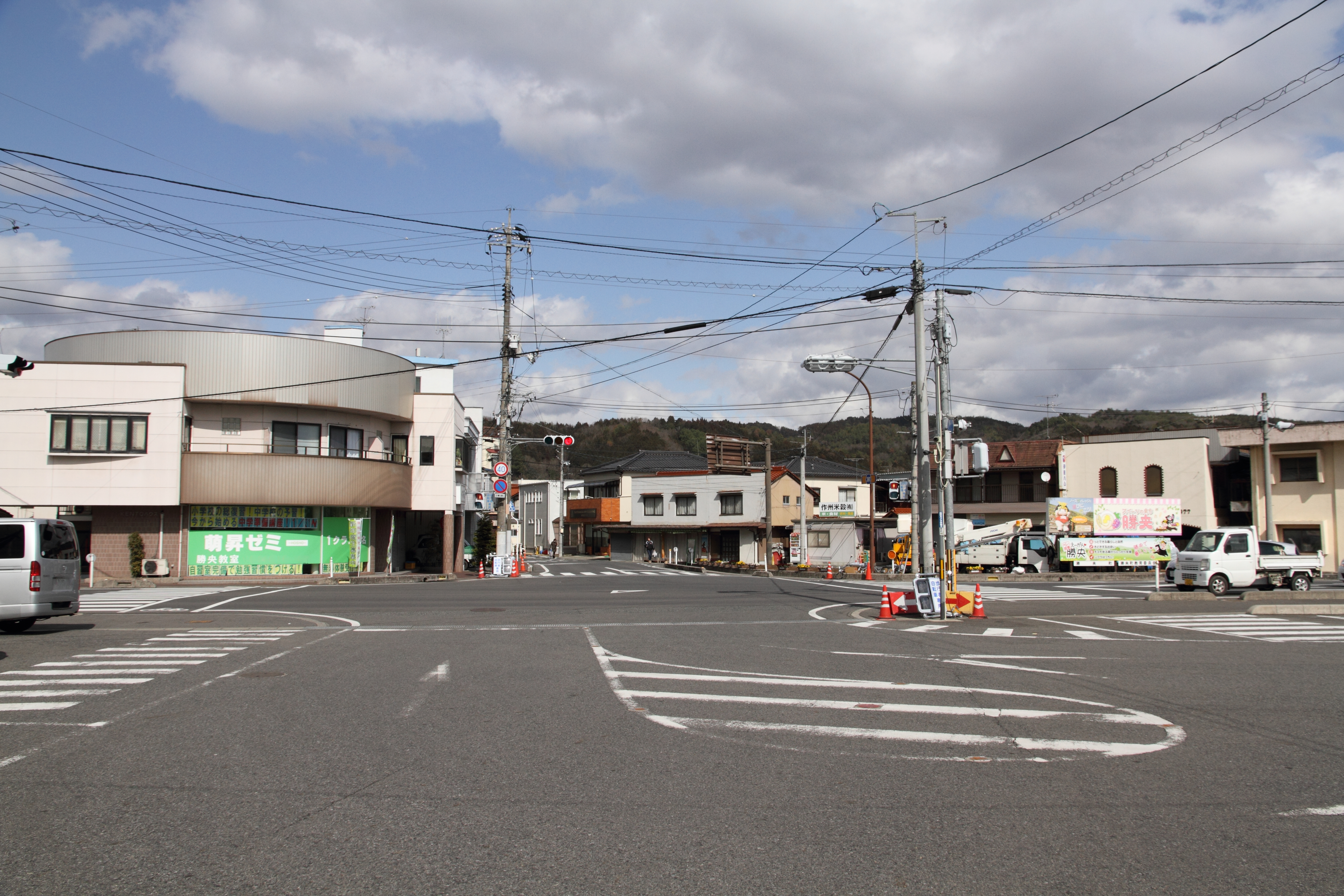 勝間田駅の駅周辺の様子 Canon EOS 7D